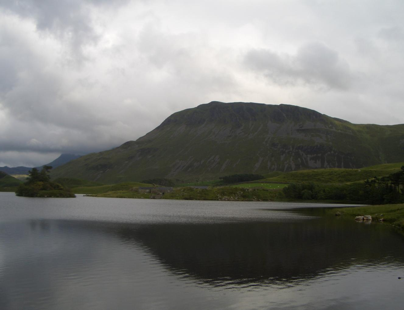 tyrrau mawr